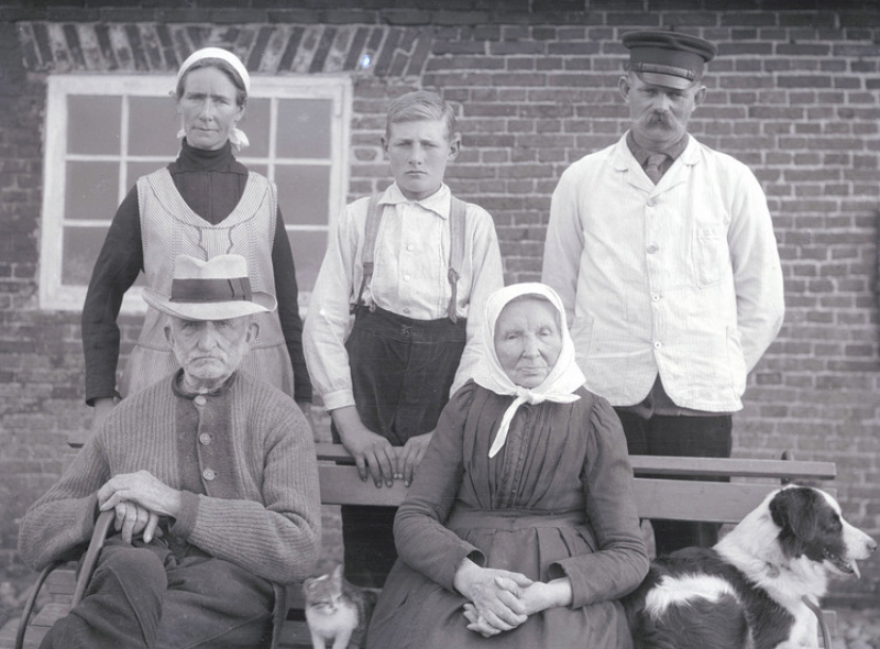 Portait einer Bauernfamilie in Morsum